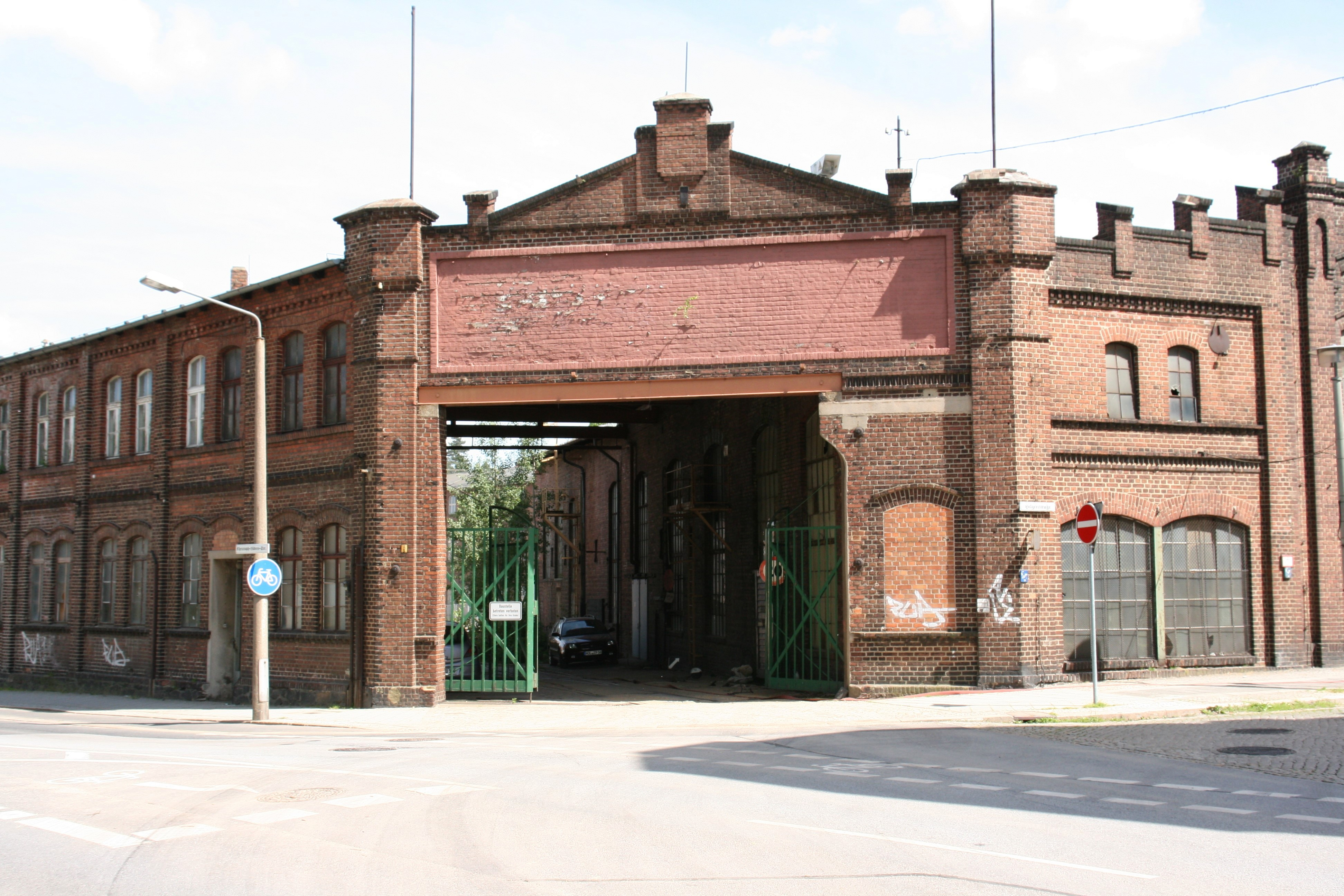 Waggonbau Görlitz Werk I, Christoph-Lüders-Straße in Görlitz